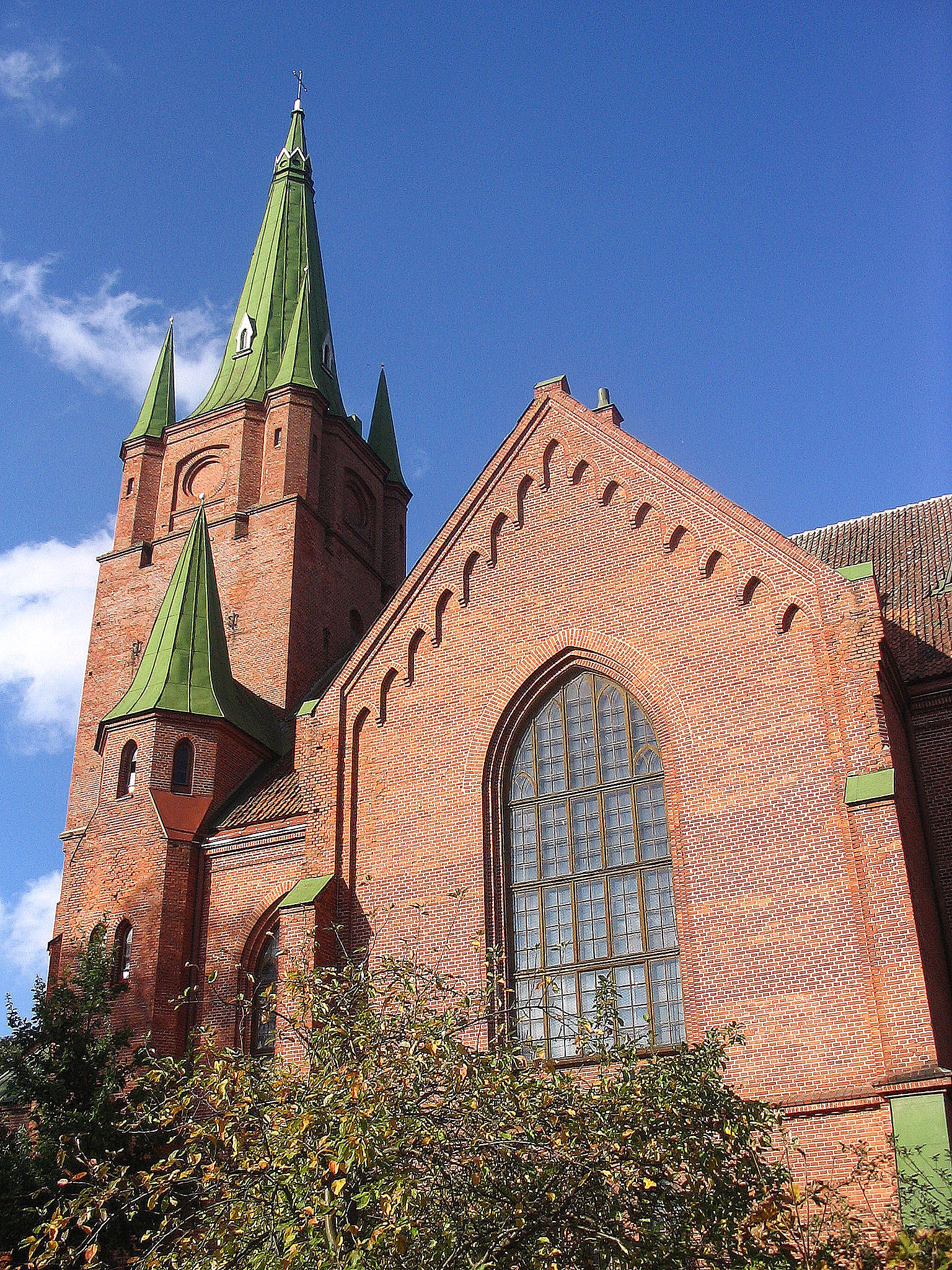 Kuldiga,St .Anne’s Evangelic Lutheran church